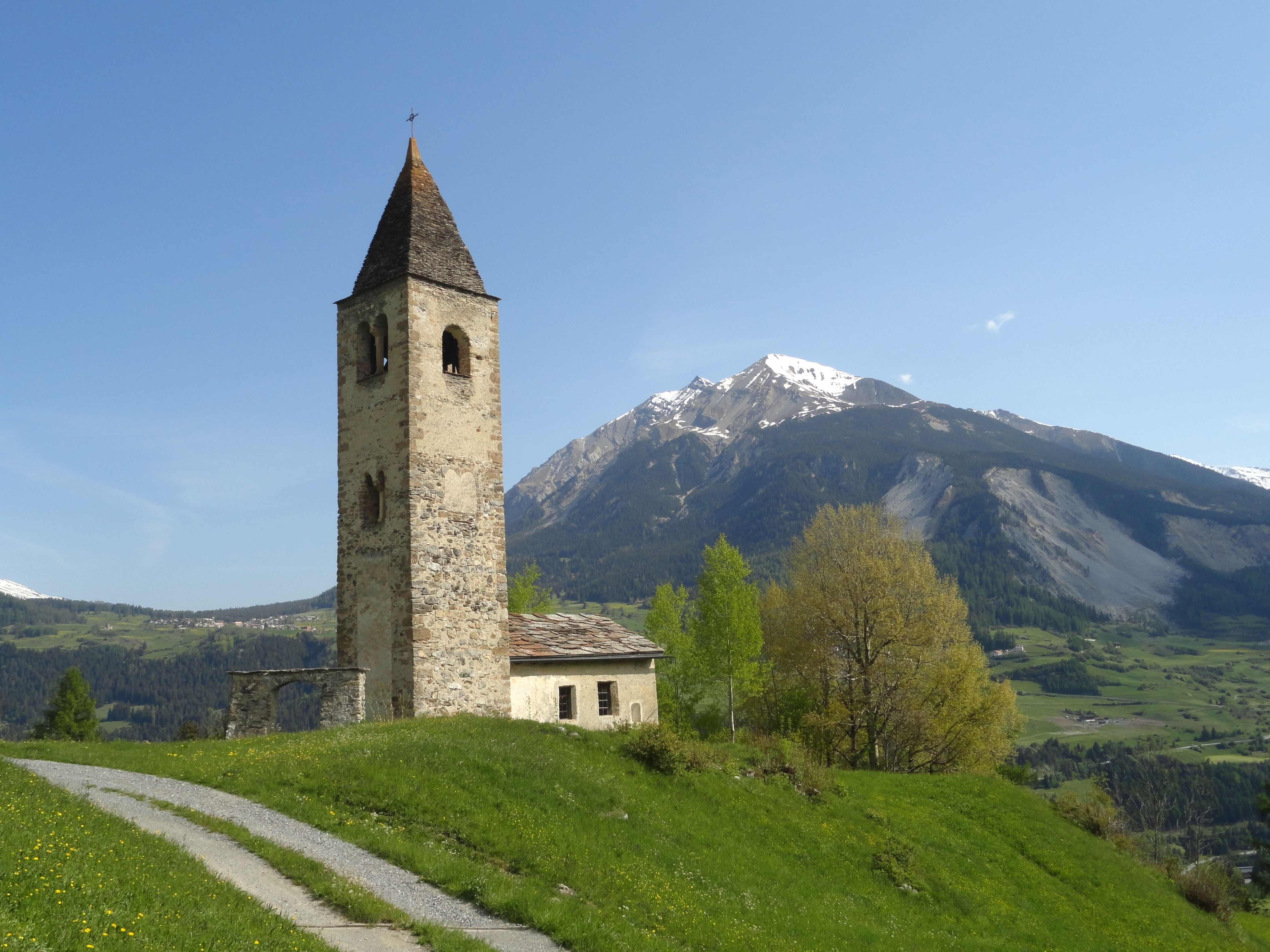 Kirche St. Cosmas und Damian (Mon GR): von Süden